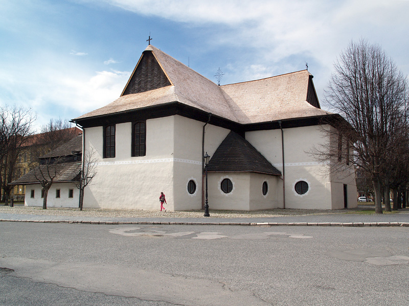 Kežmarok - Drevený evanjelický artikulárny Kostol Najsvätejšej Trojice